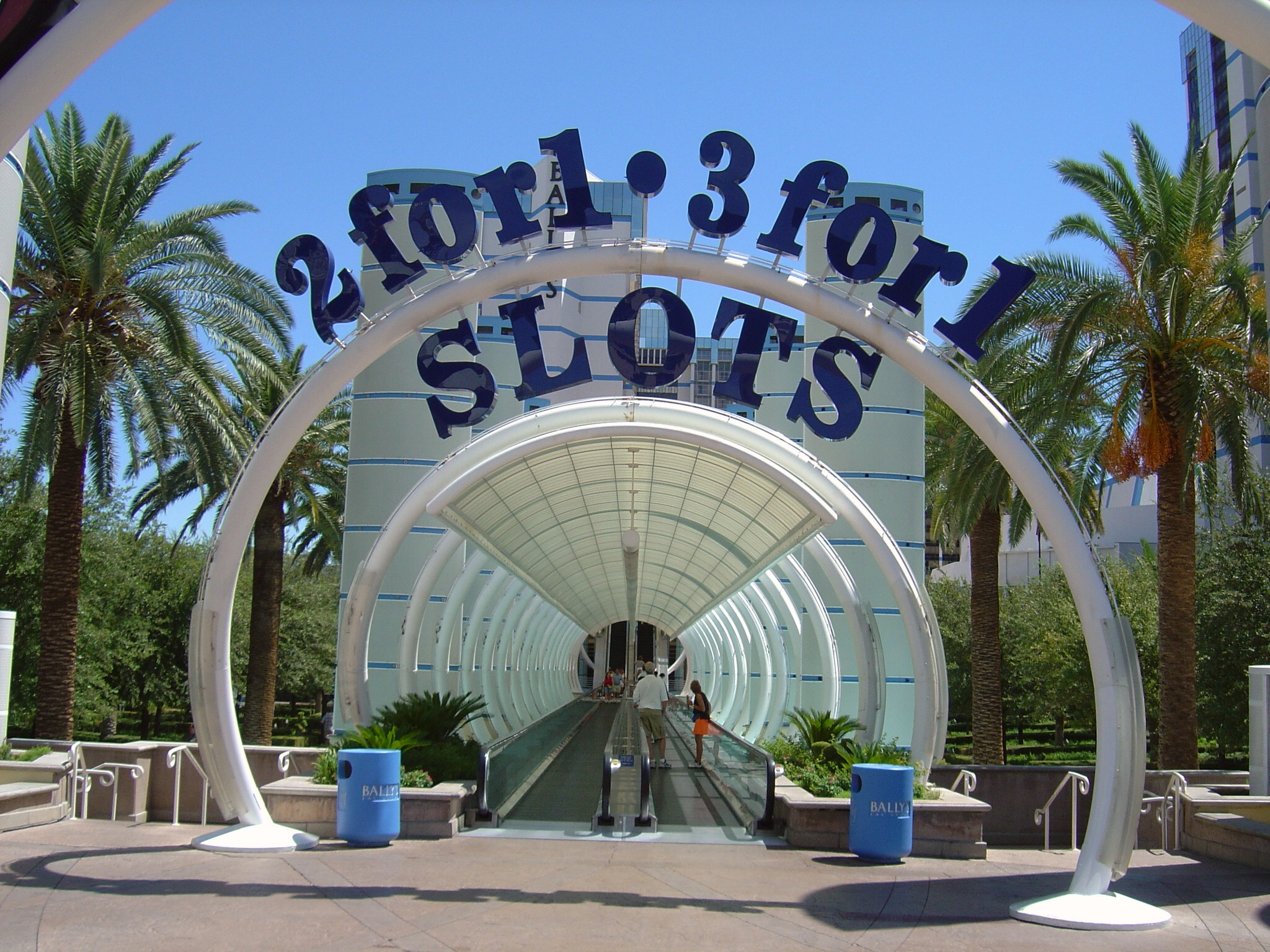 auf dem Laufband geht es ins Hotel